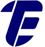 Logotipo do CEFET/RJ